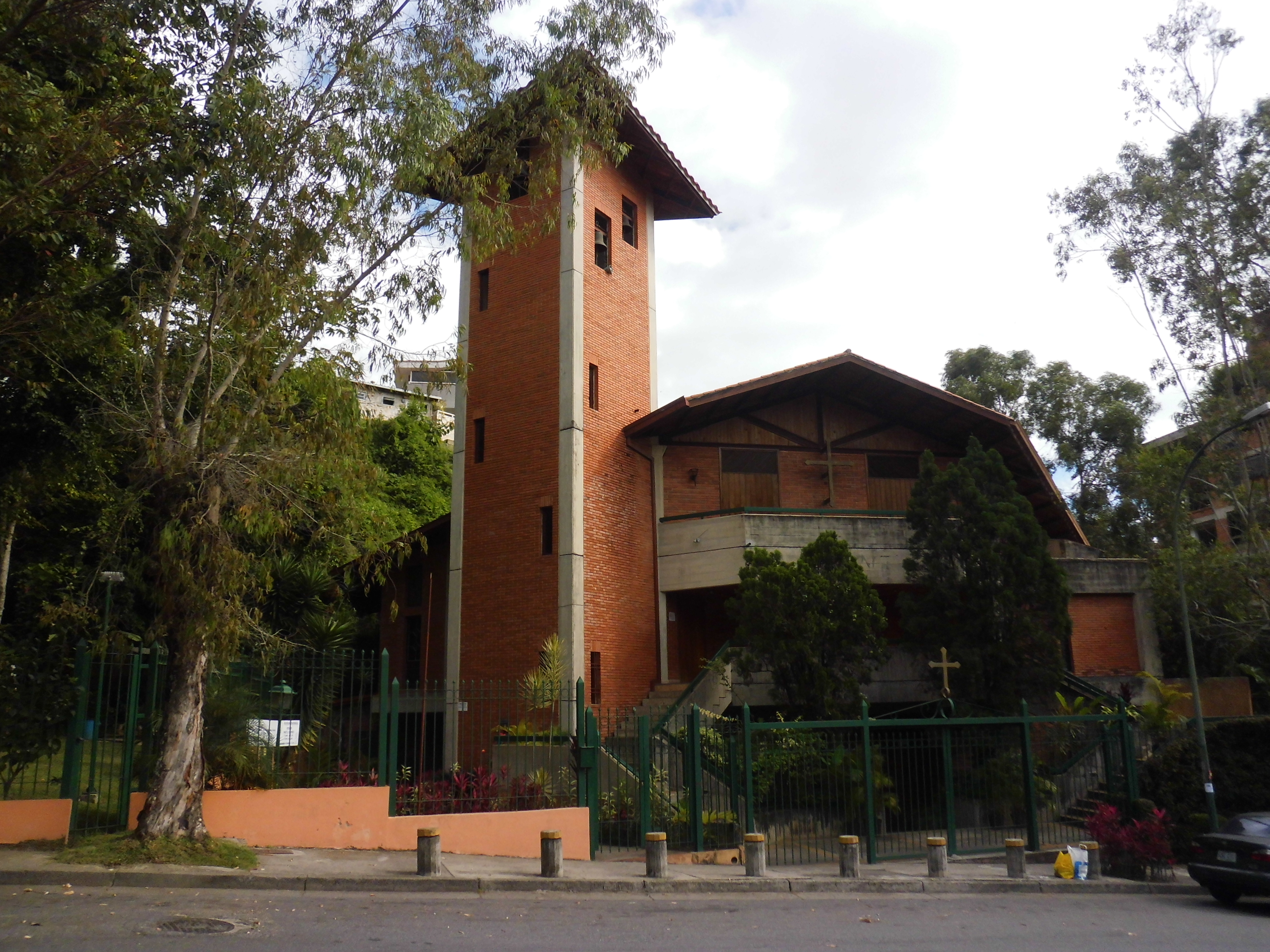 Iglesia de La Anunciación del Señor en La Boyera, municipio El Hatillo, estado Miranda - Venezuela